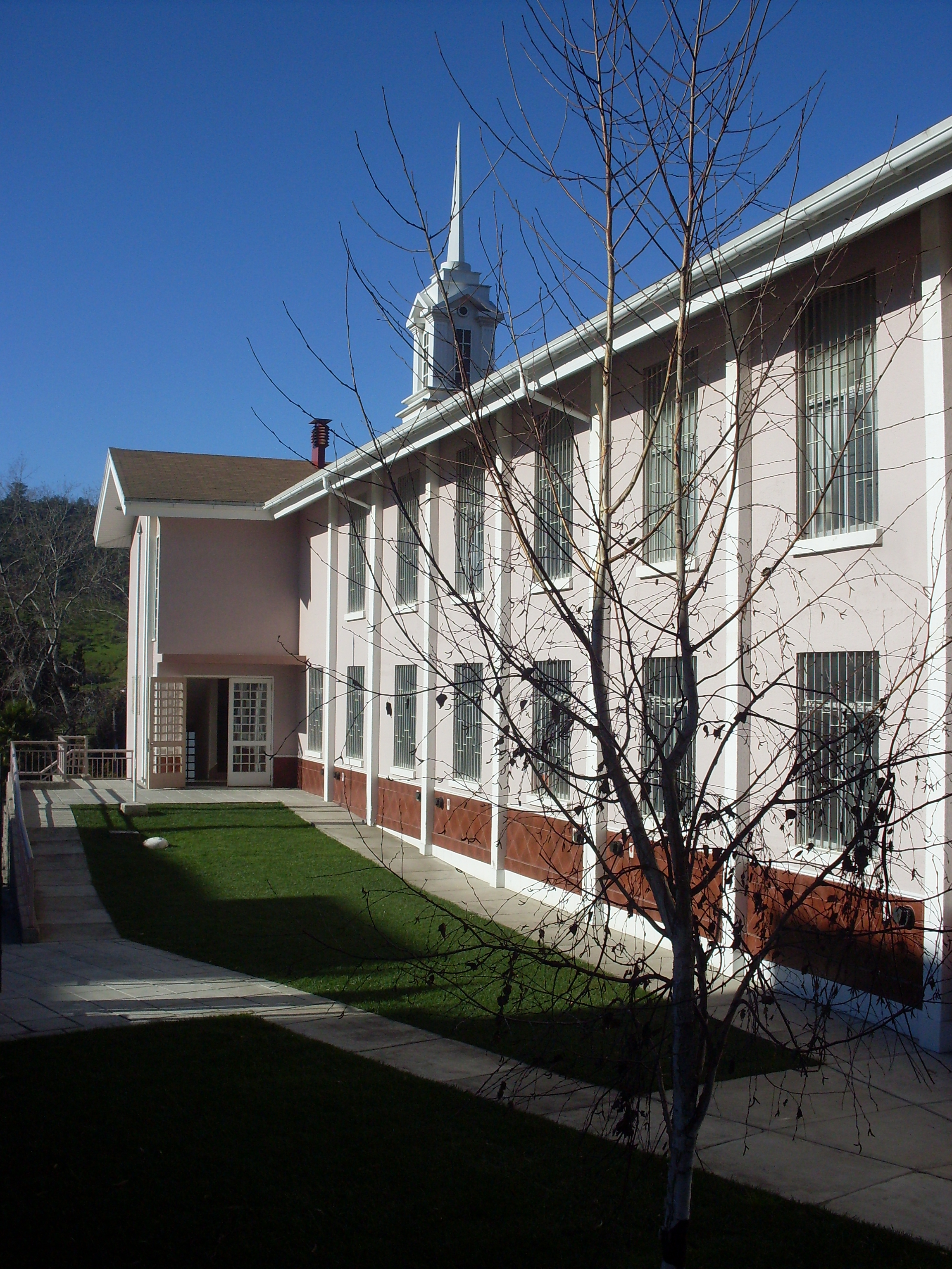 Capilla de la Iglesia de Jesucristo de los Santos de los Últimos Días, ubicada en esquina calle Cooperación con Figueroa Larraín, ciudad de Quilpué, Chile.